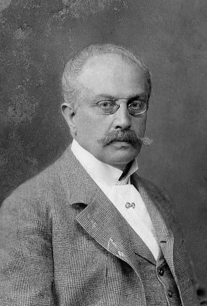 Portrait des Schriftstellers Felix Philippi, 1900